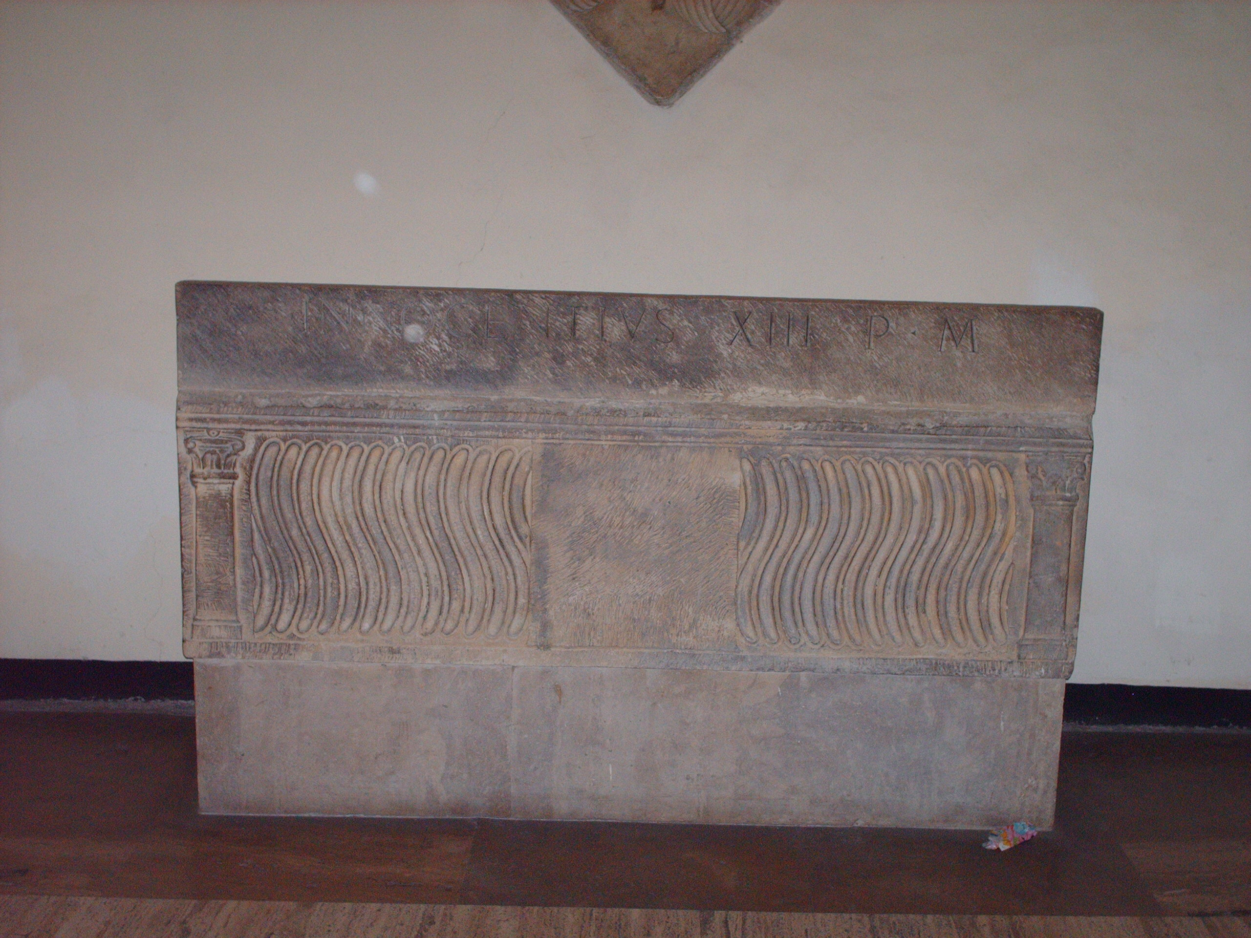 Tomb of Julius III, "grotte vaticane", Basilica di San Pietro